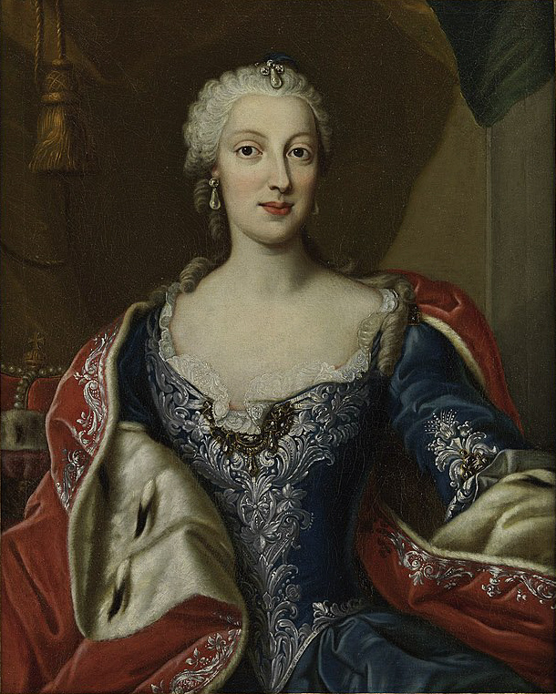 Maria Anna von Sachsen (1728–1797), Gemahlin Maximilians III. Joseph von Bayerntitle QS:P1476,de:"Maria Anna von Sachsen (1728–1797), Gemahlin Maximilians III. Joseph von Bayern" label QS:Lde,"Maria Anna von Sachsen (1728–1797), Gemahlin Maximilians III. Joseph von Bayern"